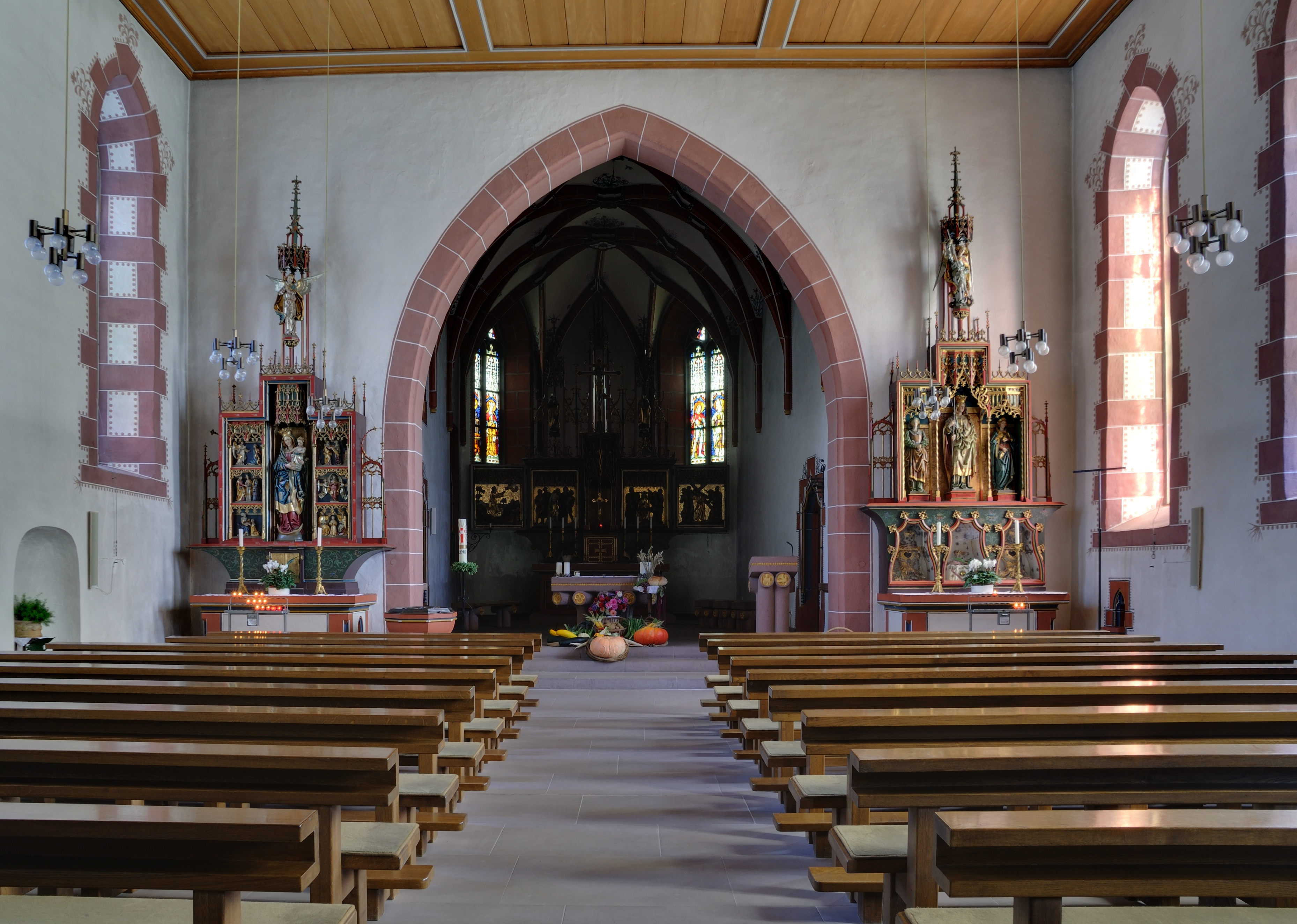 Rheinfelden-Eichsel: Langhaus der Galluskirche